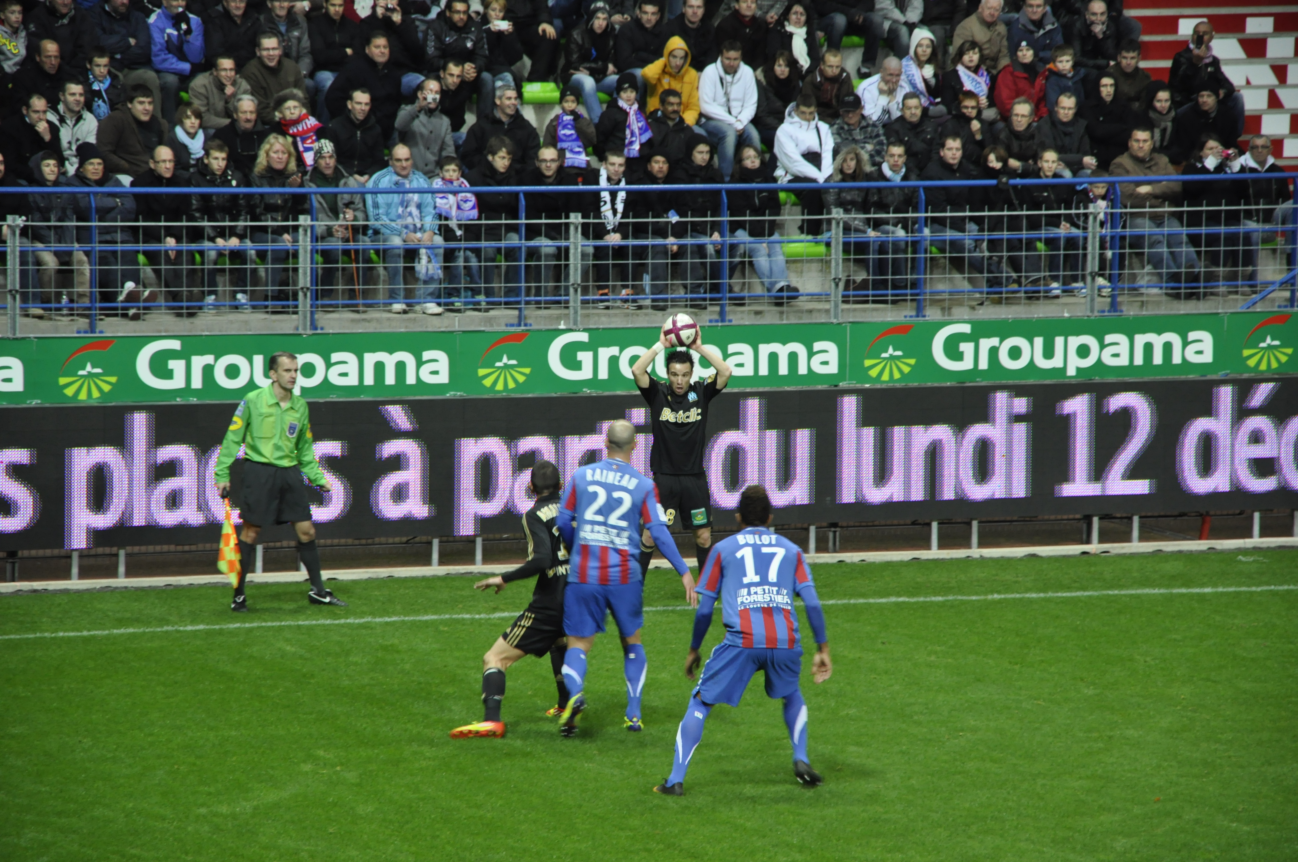 Mathieu Valbuena et Morgan Amalfitano face à Frédéric Bulot et Alexandre Raineau lors du match entre Caen et Marseille le 2 décembre 2011 au stade Michel d'Ornano